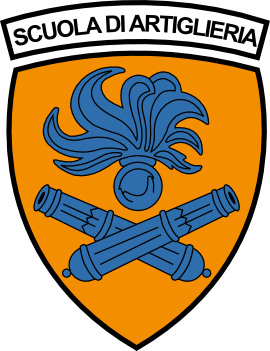 Scudetto della Scuola di Artiglieria dell'Esercito.